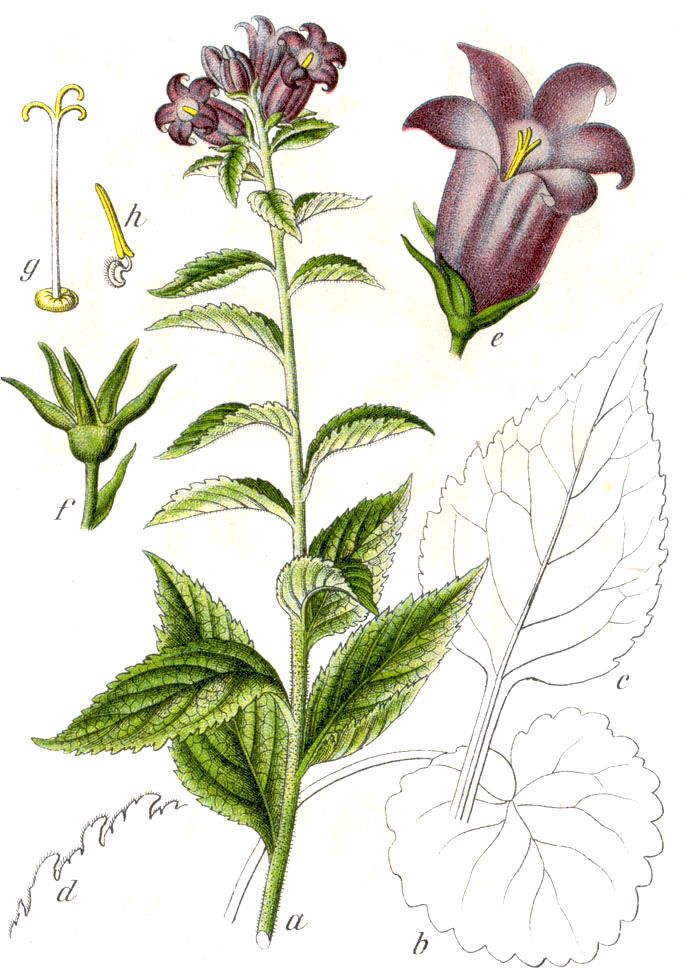 Campanula latifolia L. Original Caption Breitblätterige Glockenblume, Campanula latifolia